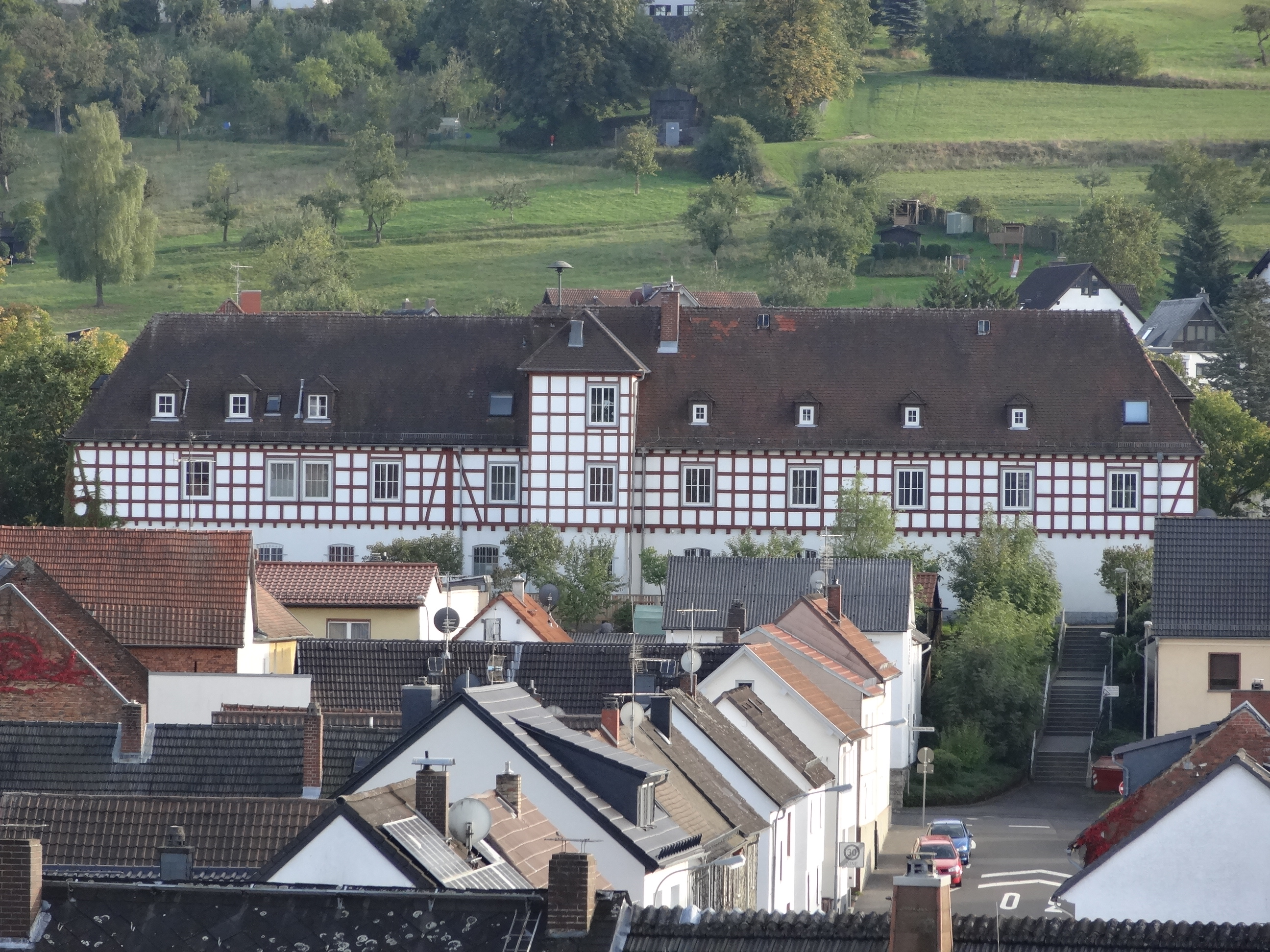 Rathaus Wettenberg in Krofdorf-Gleiberg